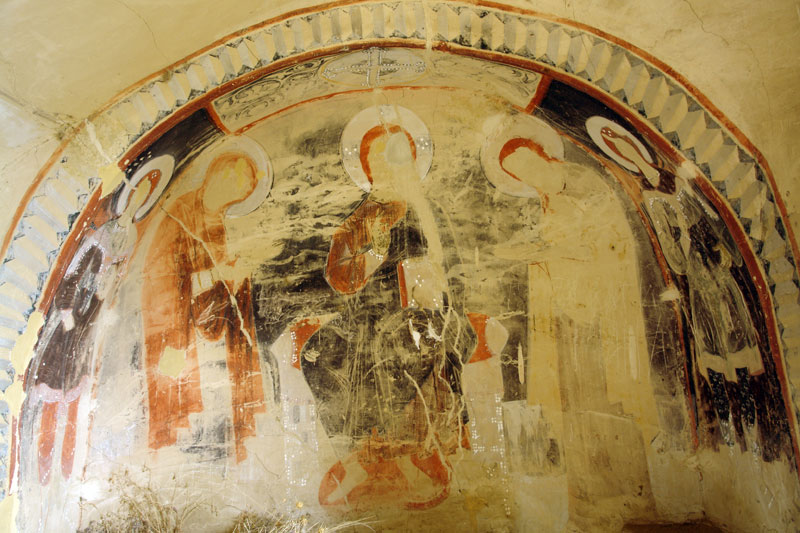 Medieval fresco in David Gareja monastery, Georgia.